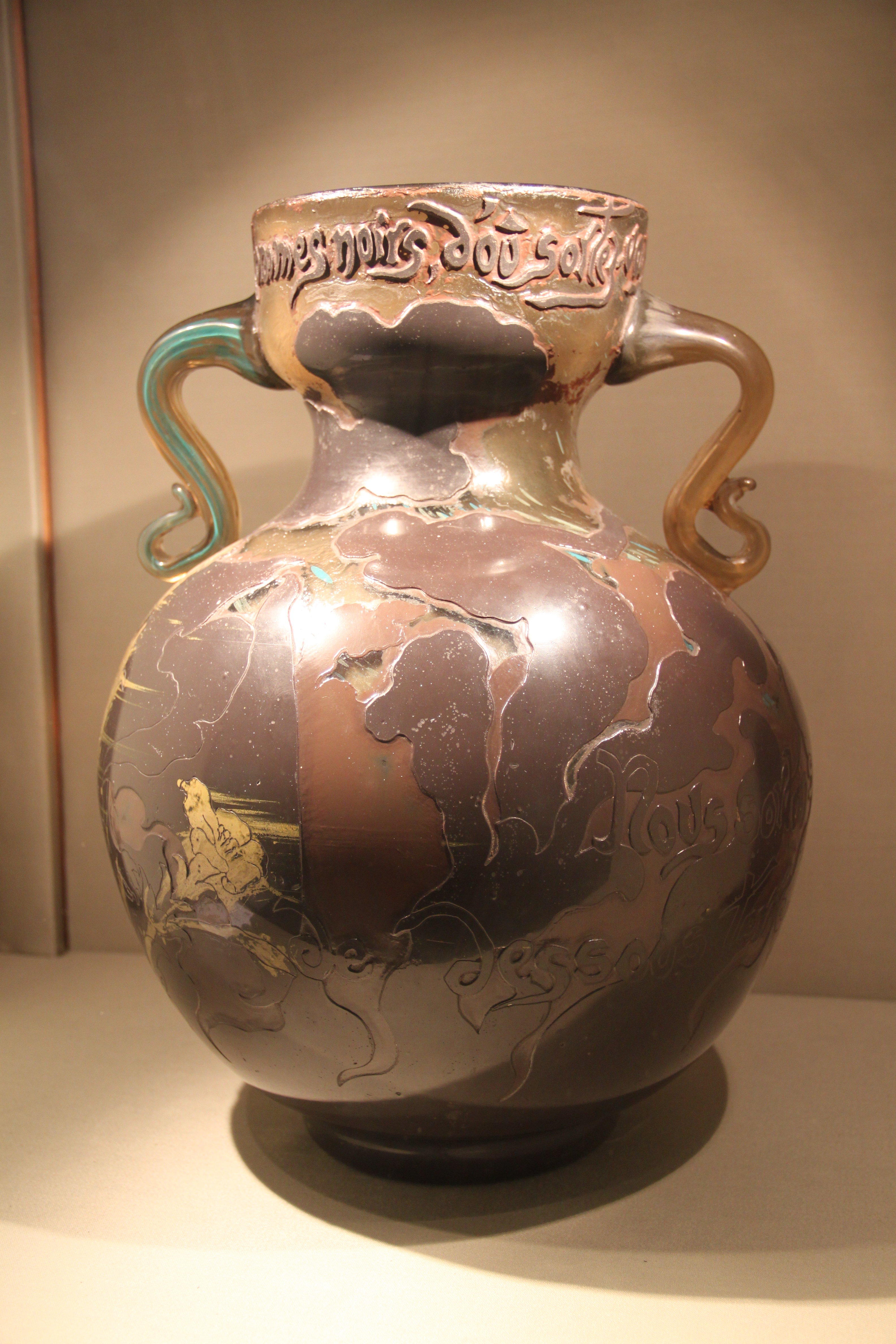 Vase Hommes noirs, 1900, par Émile Gallé (1846-1904) Et Victor Prouvé (1858-1943) Signature en creux Gallé et V.Prouvé Inscription en relief sur la pièce : Hommes noirs d'où sortez-vous ? / Nous sortons de dessous terre / Béranger Présenté à l'exposition universelle de Paris, 1900. Les hommes noirs représentent les juges et militaires qui ont activement participé à la condamnation de Dreyfus. De la boue noir sort un lys, symbole de pureté et d'espoir.